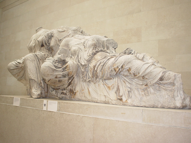 Greek sculpture